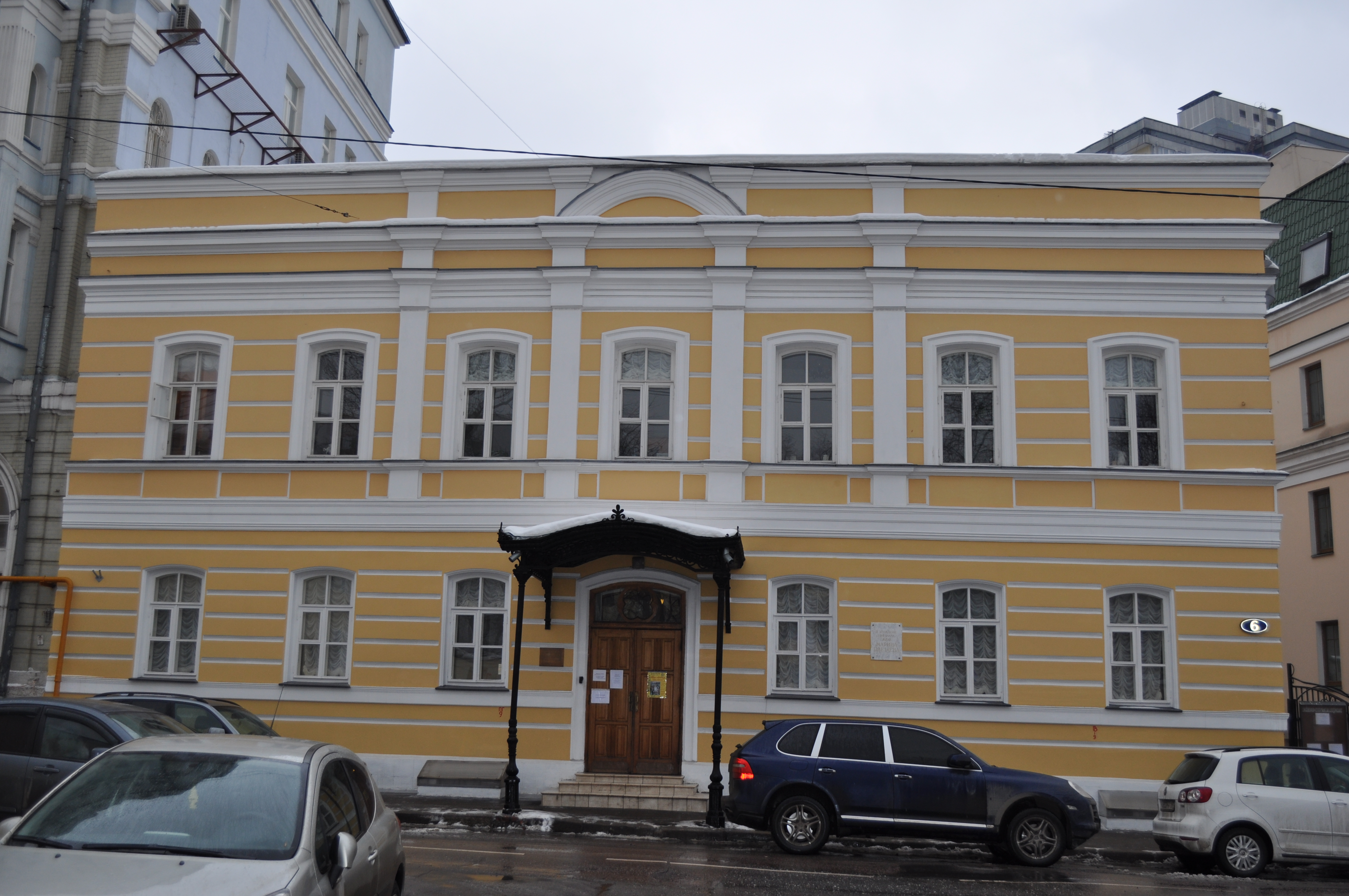 дом-музнй в Борисоглебском переулке